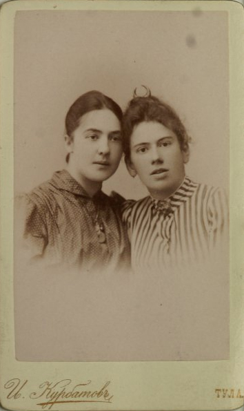 Софья Эммануиловна Дмитриева-Мамонова (слева) и Татьяна Львовна Толстая (справа). Фото И. Курбатова. 1889 г.